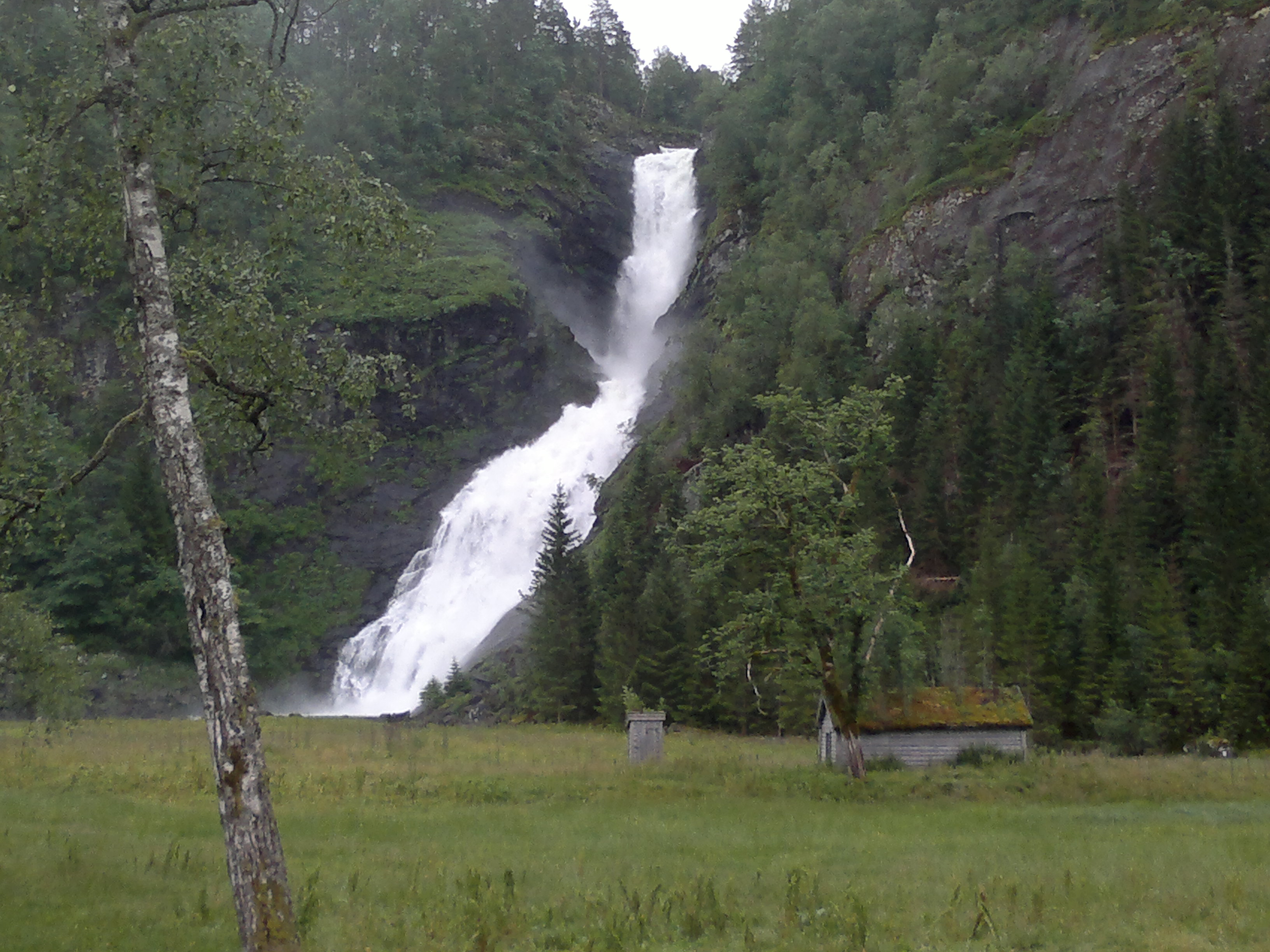 Huldefossen Sunnfjordissa, Norjassa.